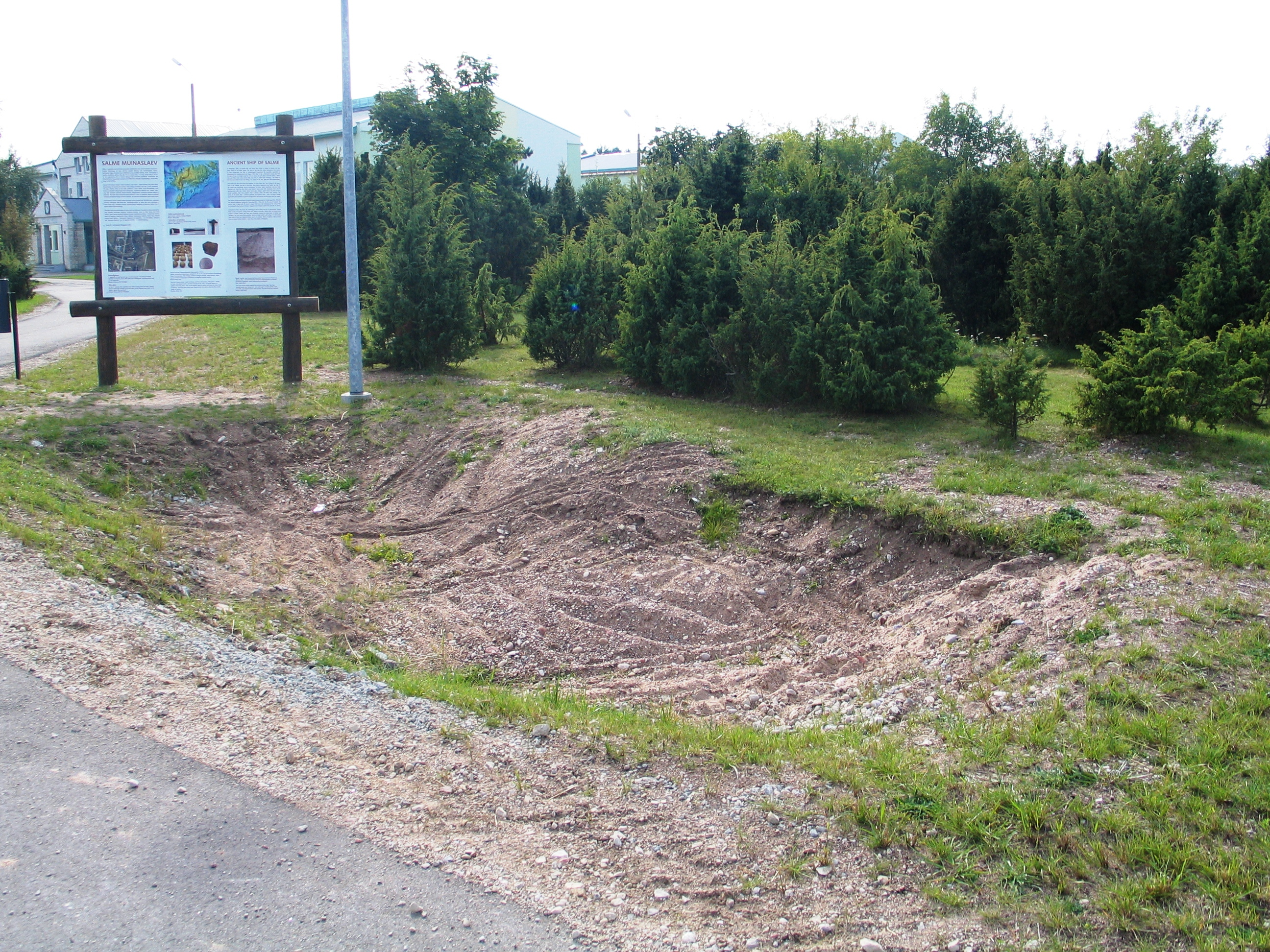 Salme muinaslaeva koht.